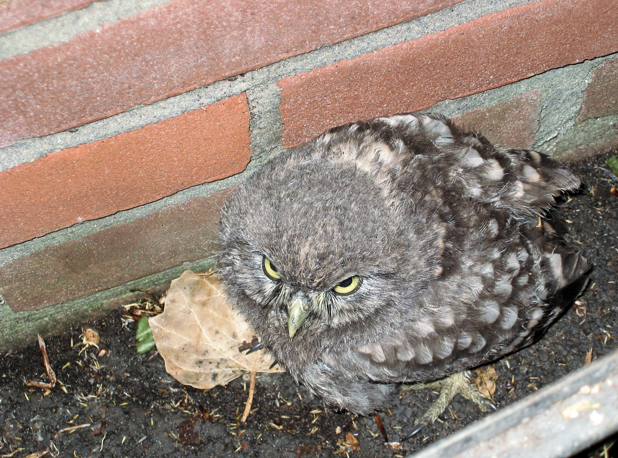 Athene noctua (Steenuilkuiken)